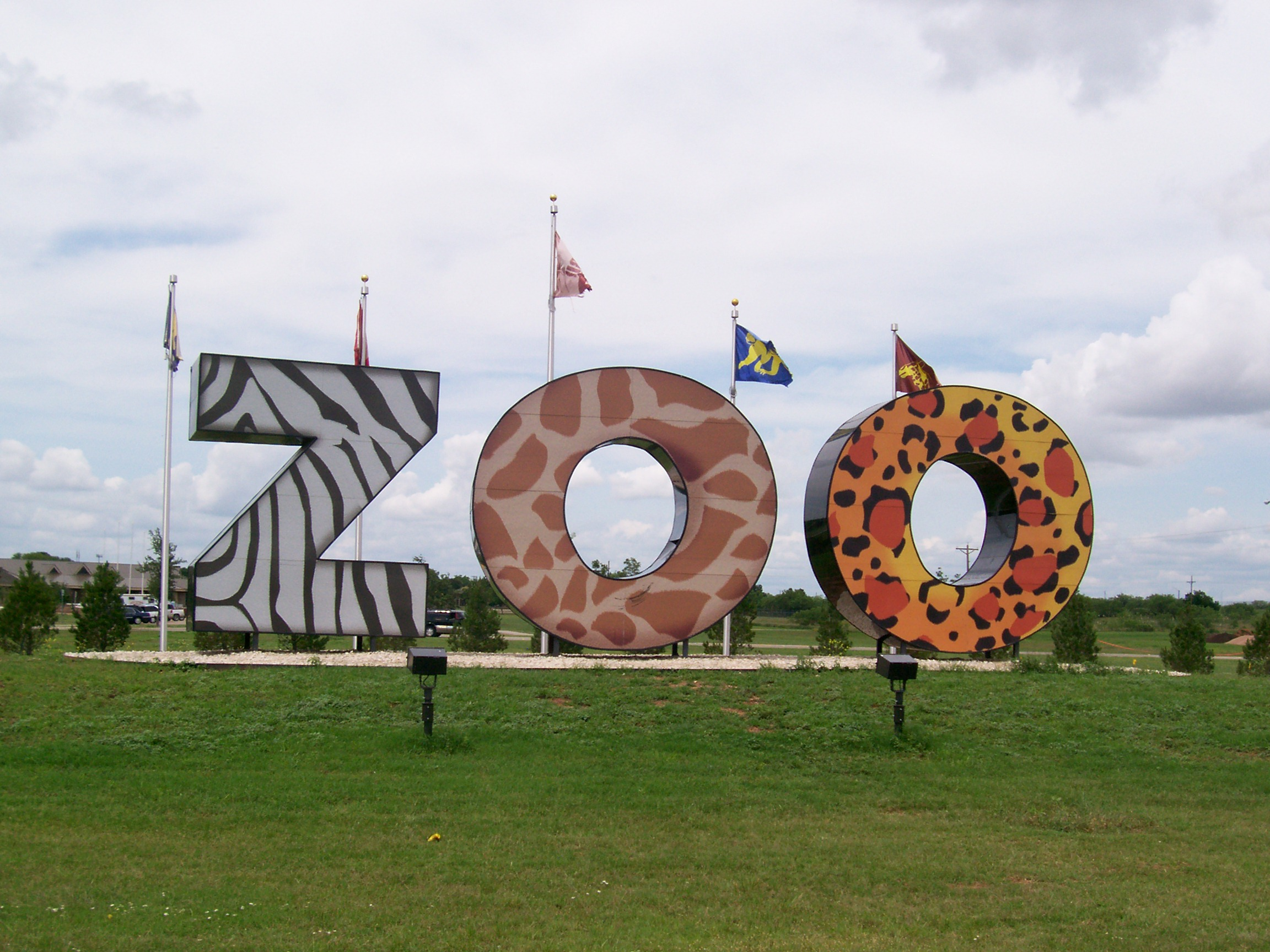 Abilene Zoo entrance sign